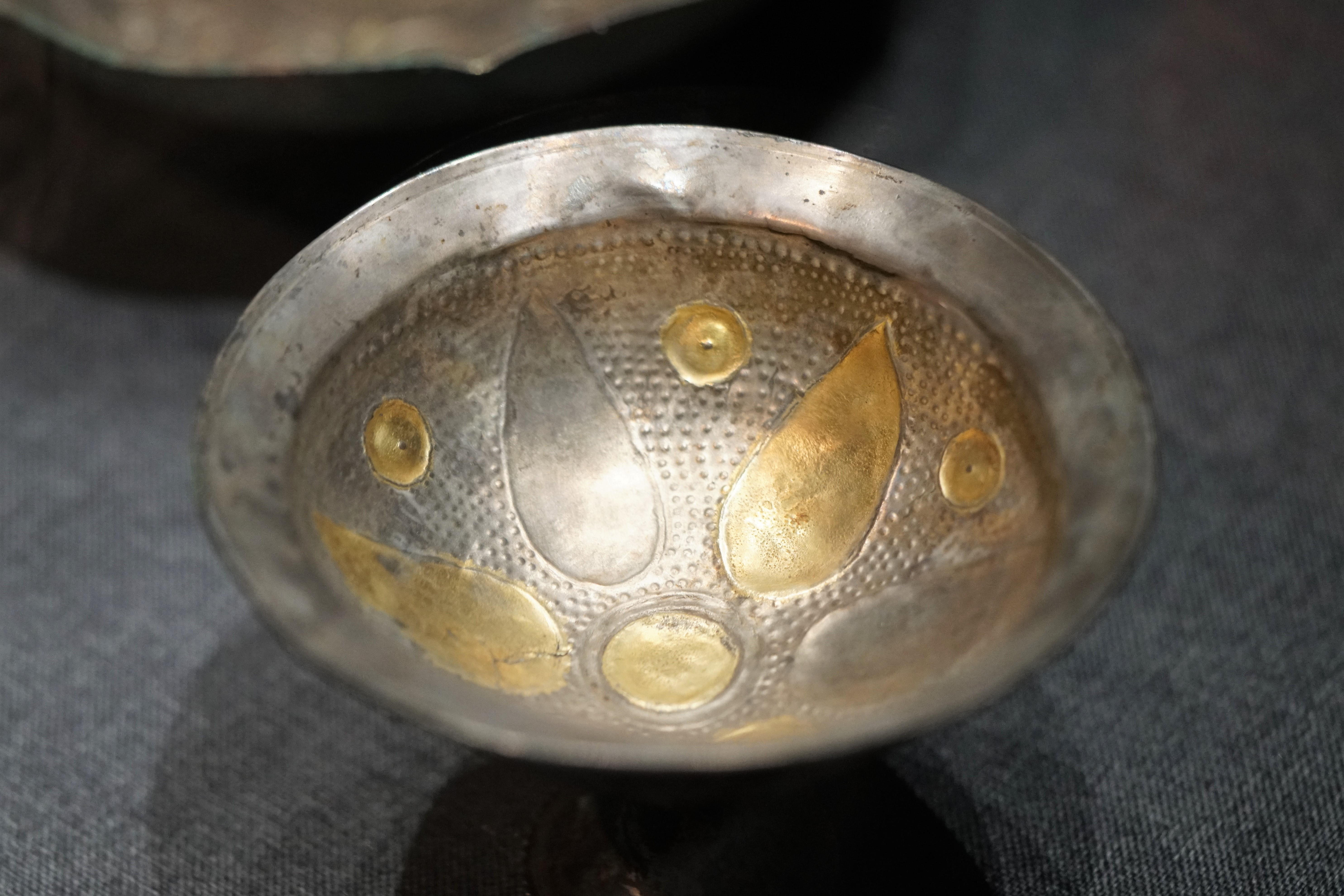 中文（中国大陆）: 高脚杯 萨珊王朝 杯内饰鱼形纹、树叶纹，纹样镀金